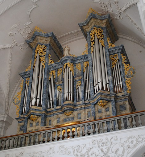 Grand Orgue de l'abbatiale de Bellelay (reconstruit par Kuhn selon Joseph Bossart, 1665-1748)